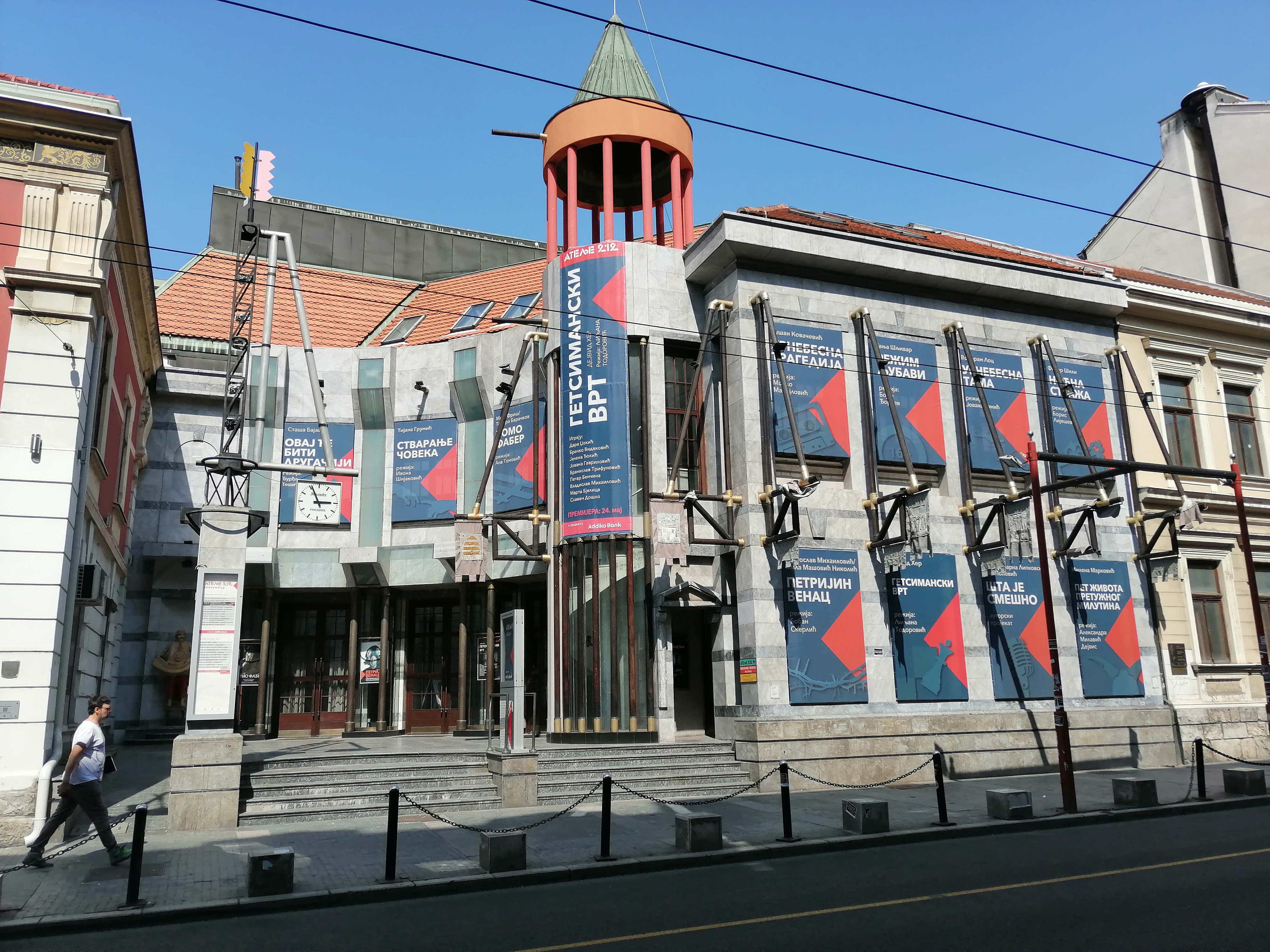 Srpski (latinica): Atelje 212, Beograd